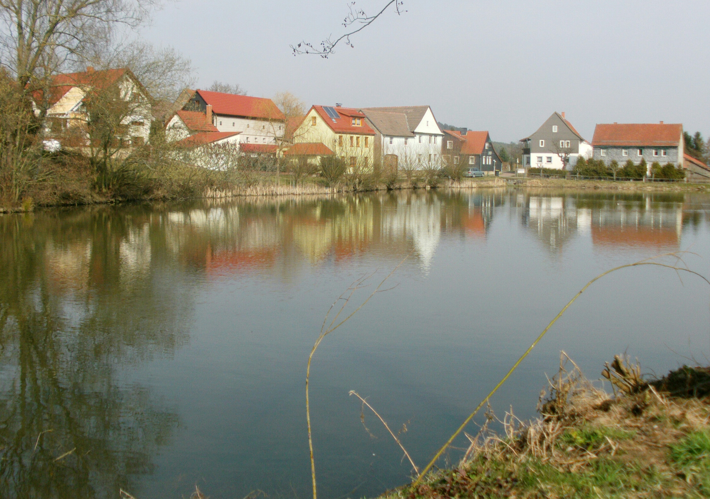 Der Dorfteich von Traßdorf in Thüringen